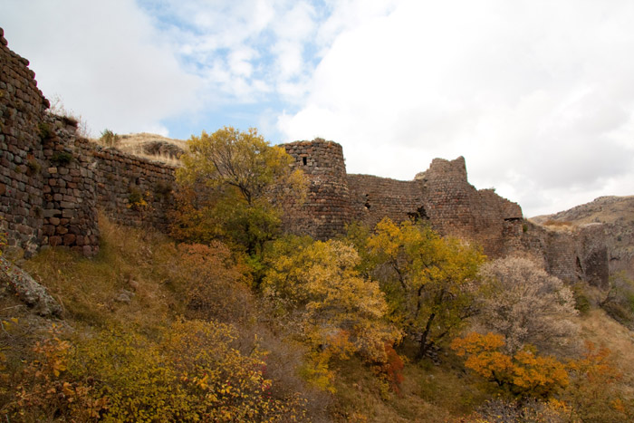 la forteresse